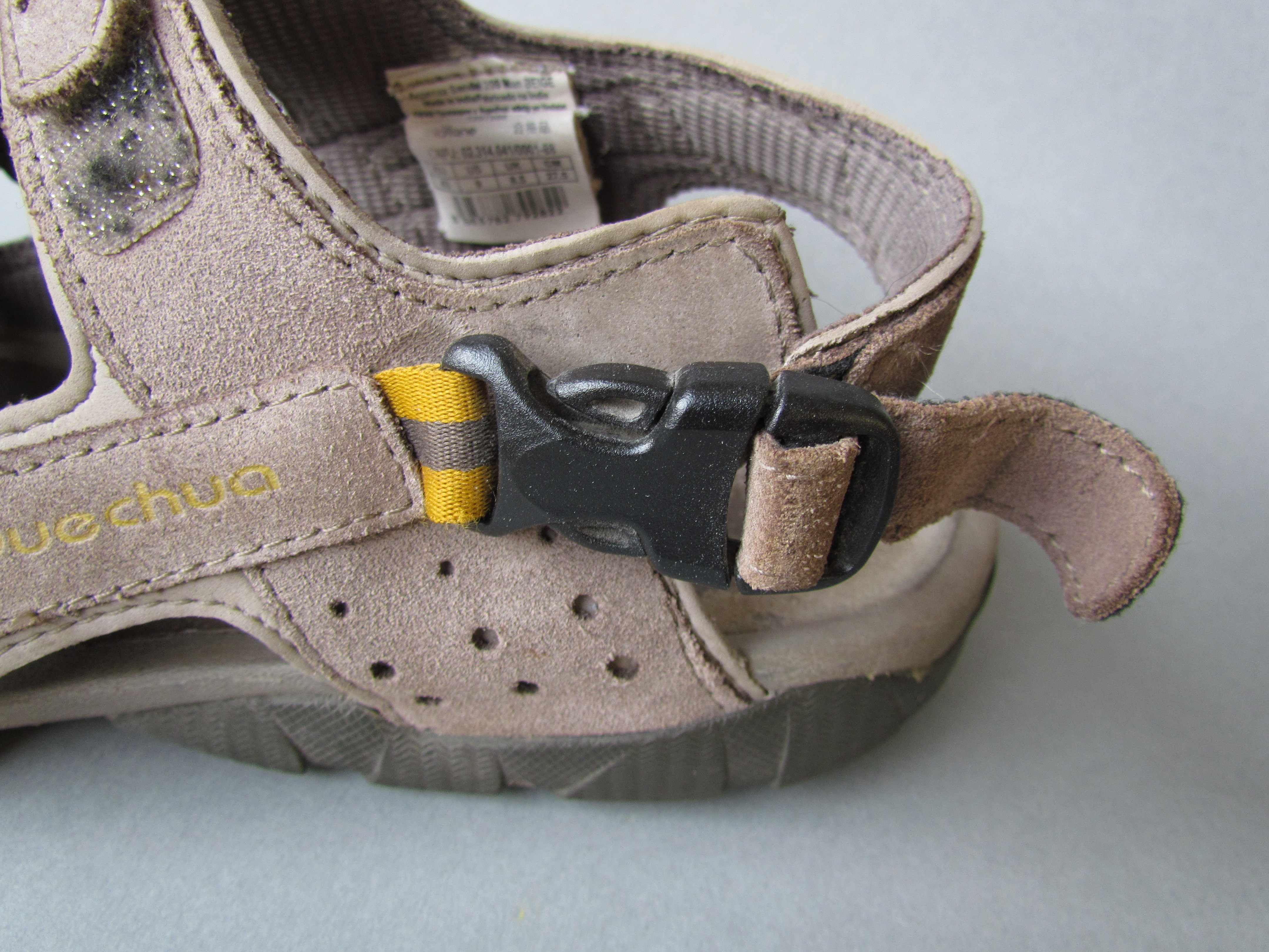 Bildinhalt: Geschlossene Klickschnalle an einer Sandale Aufnahmeort: Baden-Baden, Deutschland